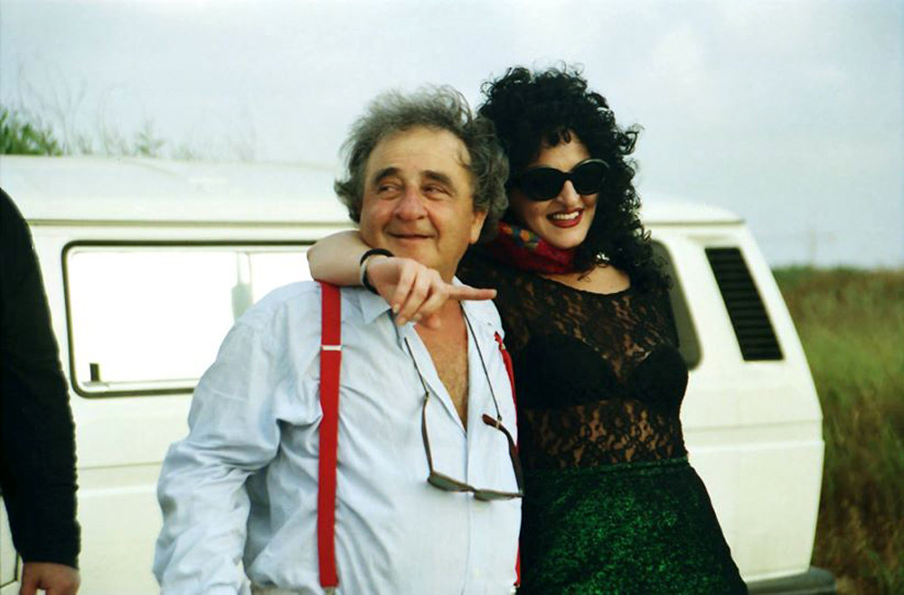 יענקלה בן סירא והשחקנית חלי קניזו